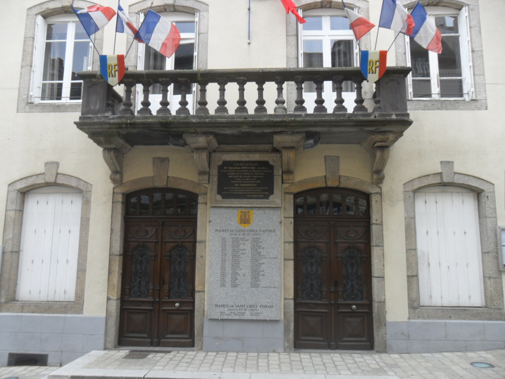 Mairie de Saint-Chély-d'Apcher (entrée)